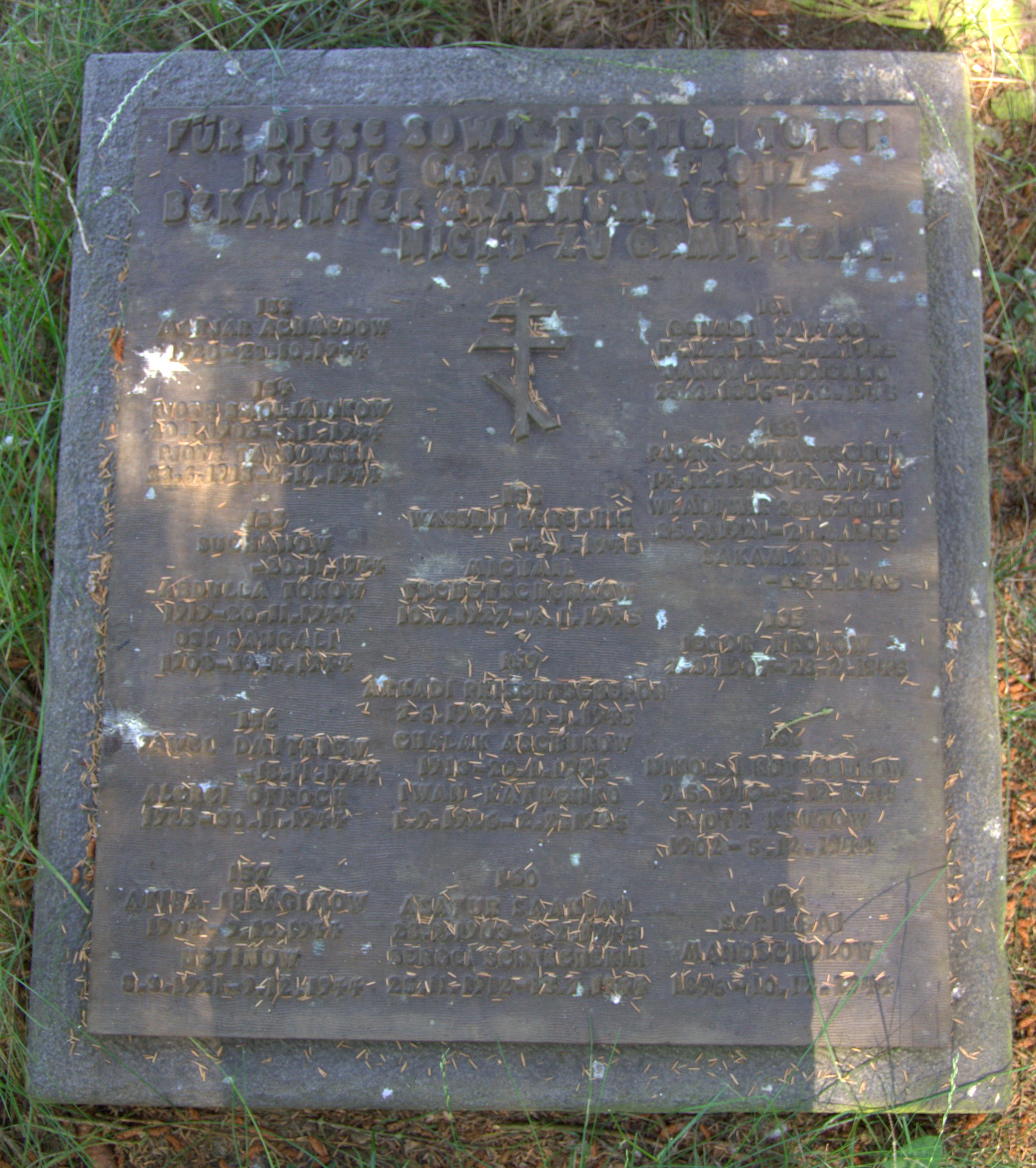 Gedenktafeln für die Ehrung der verstorbenen des Kriegsgefangenenlagers Stalag IX A Ziegenhain